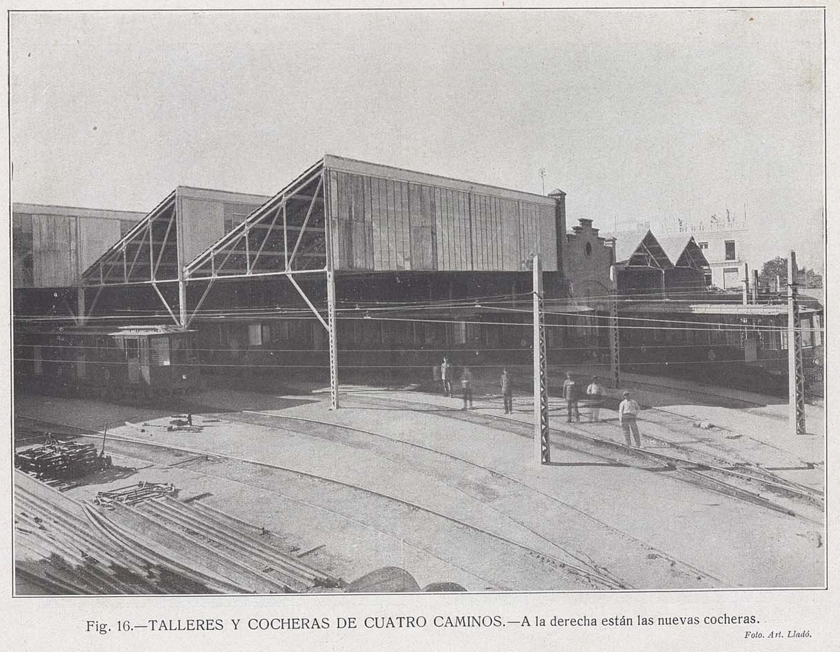 Vista de las Cocheras con la 2º ampliacion, 1921